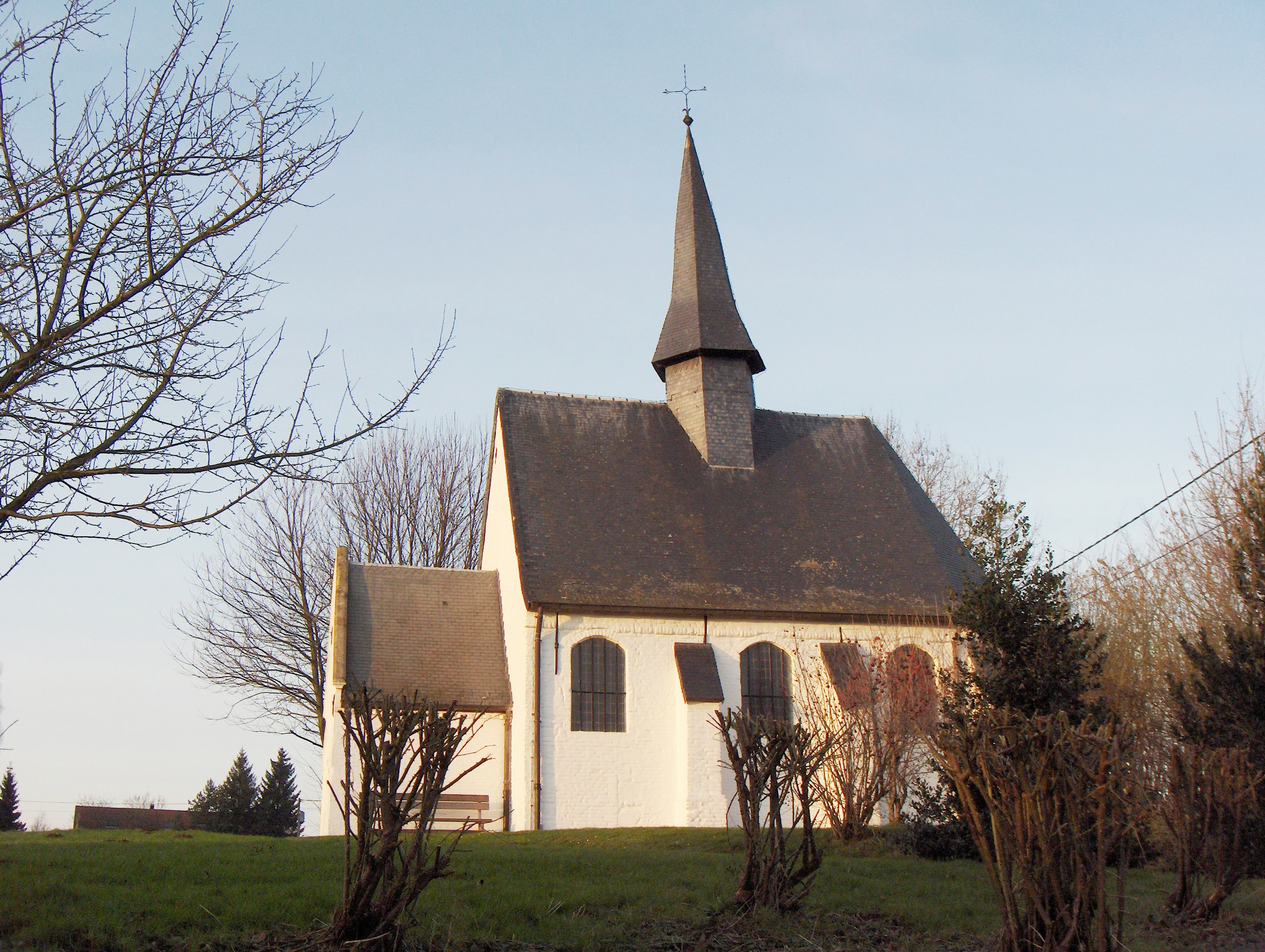 Gooik, Ortsteil Strijland (Belgien, Prov. Fläm. Brabant), Woestijnkapel (Kapelle der Öde), ca. 1600